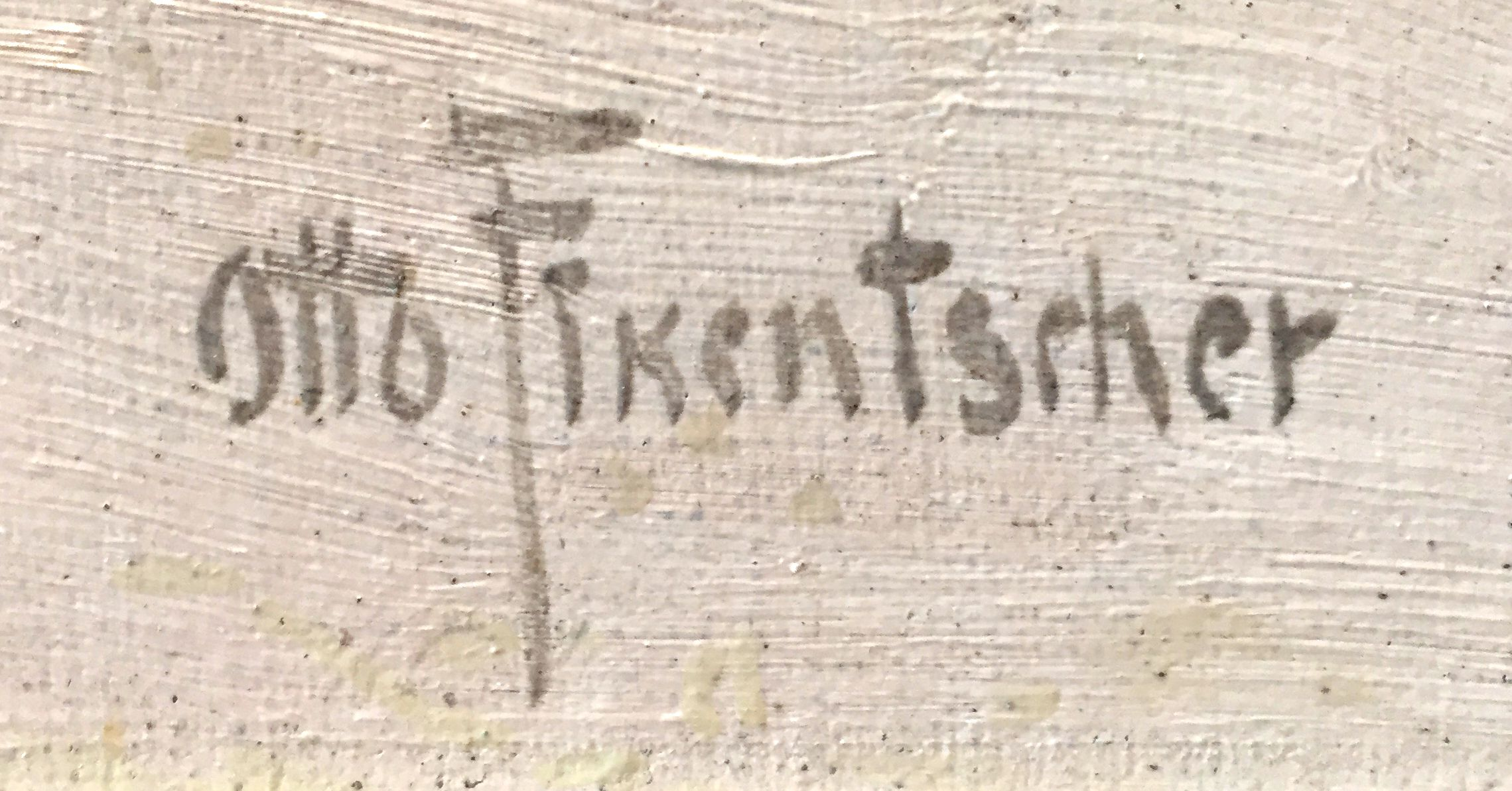 Fotografie der Signatur des Kunstlers Otto Fikenscher